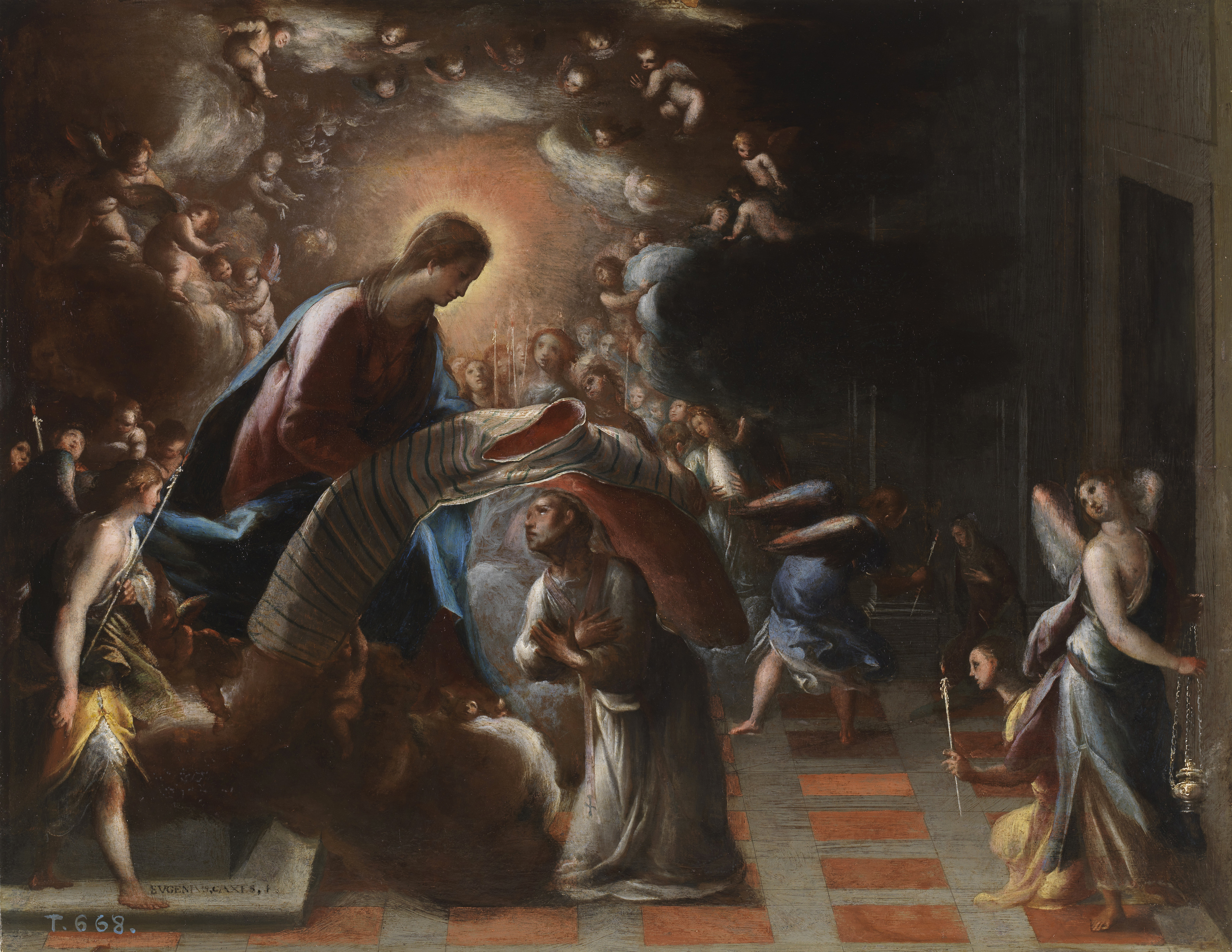 La obra representa a la Virgen María imponiendo la casulla al arzobispo San Ildefonso de Toledo, y es posible que formara parte de un retablo, aunque también, por su pequeño formato, pudo realizarse para la devoción privada. El cuidado tratamiento, la refinada iluminación y el soporte de madera son característicos de este tipo de obras. En ella el santo se encuentra arrodillado y recibe la casulla de manos de la Virgen. Todo ello se encuentra acompañado de unos ángeles que son representados rodeando la escena principal.